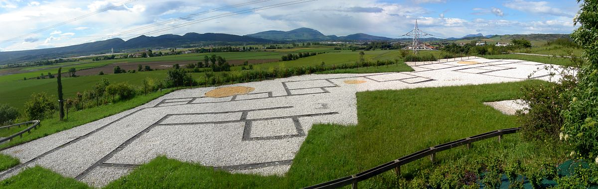 Atxako aztarnategia (Gasteiz) / Yacimiento de Atxa (Vitoria)